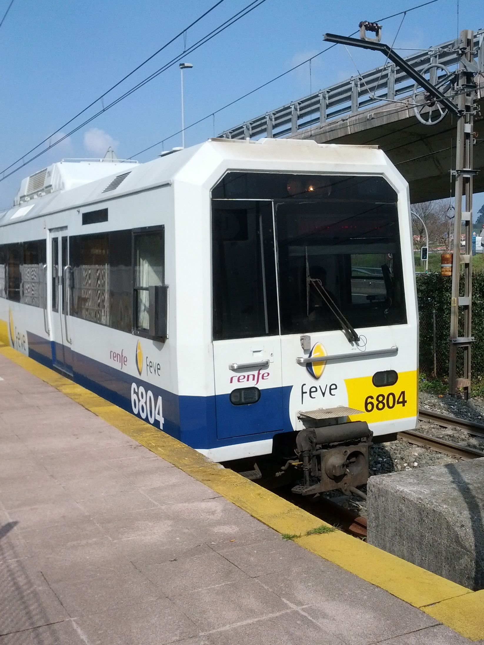 Unidad eléctrica Renfe-Feve en el apeadero de La Cantábrica (El Astillero), Cantabria (España)